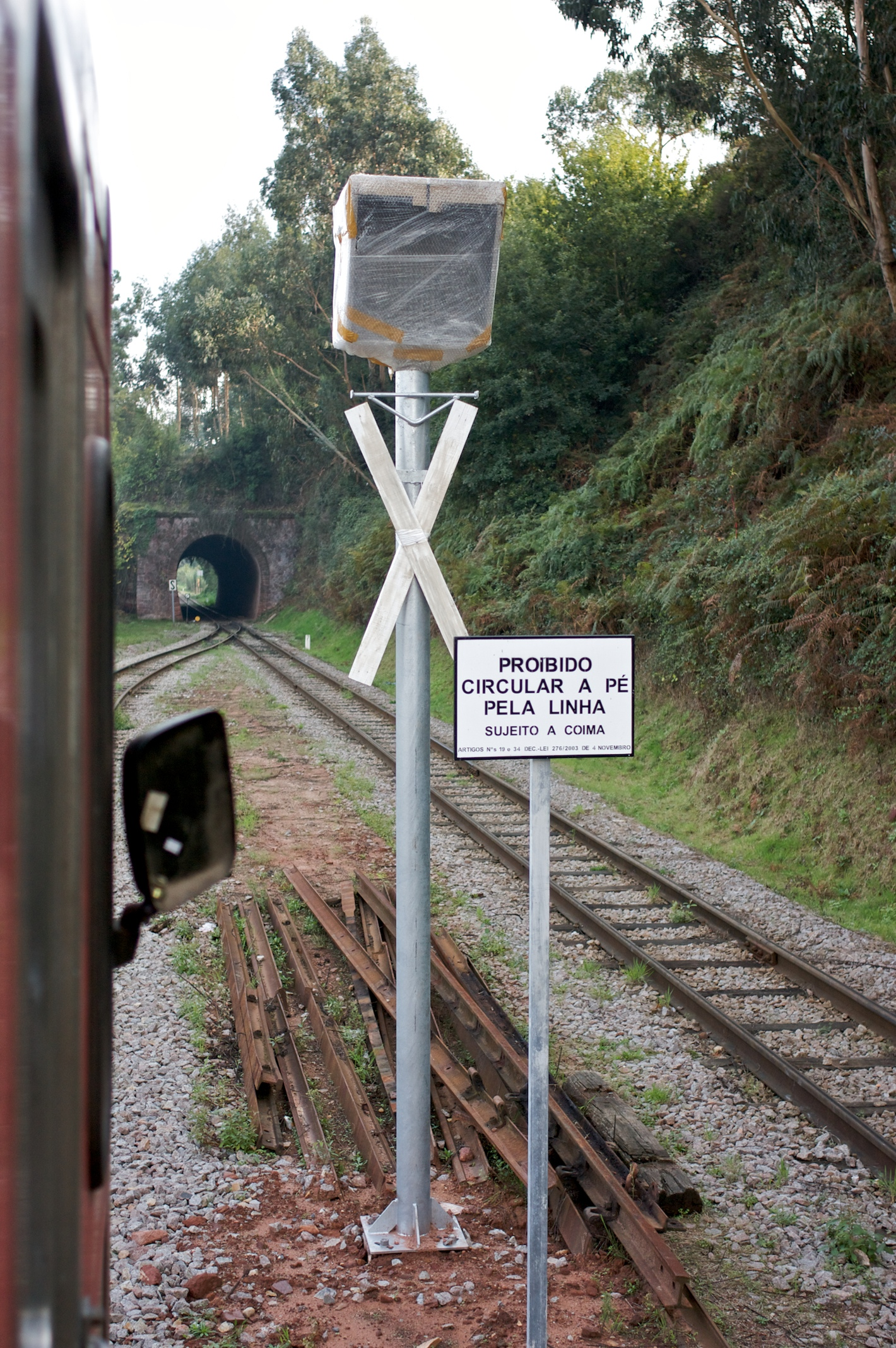 pormenor da nova sinalização. Tipo: E Estação Local: Eirol Linha do Vouga, PK 23 Data e hora: 30 de Outubro de 2009 15h57